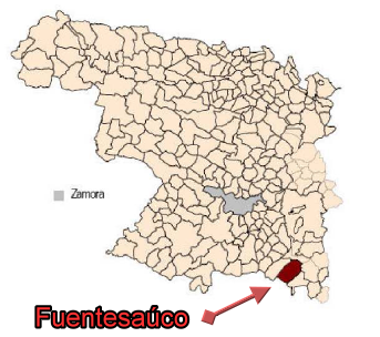 mapa de fuentesauco